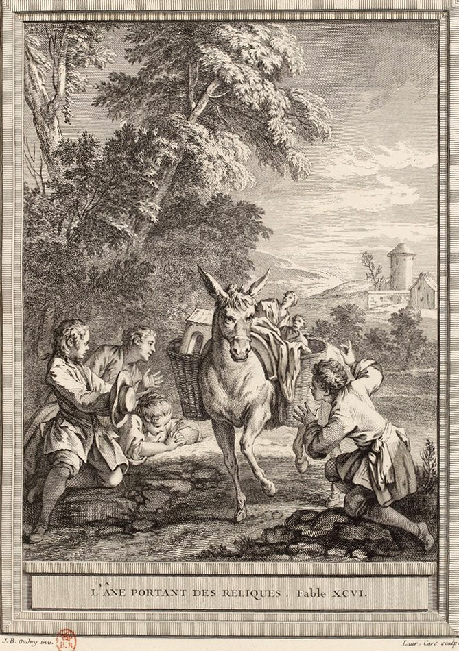 Gravure réalisée par Laurent Cars d'après un dessin de Jean-Baptiste Oudry représentant la fable L'âne portant des reliques de Jean de La Fontaine (fable 14 du livre V). Cette gravure est parue dans l'édition complète des fables de La Fontaine, parue en quatre tomes chez l'éditeur Desaint & Saillant, rue saint Jean de Beauvais à Paris, 1755-1759.